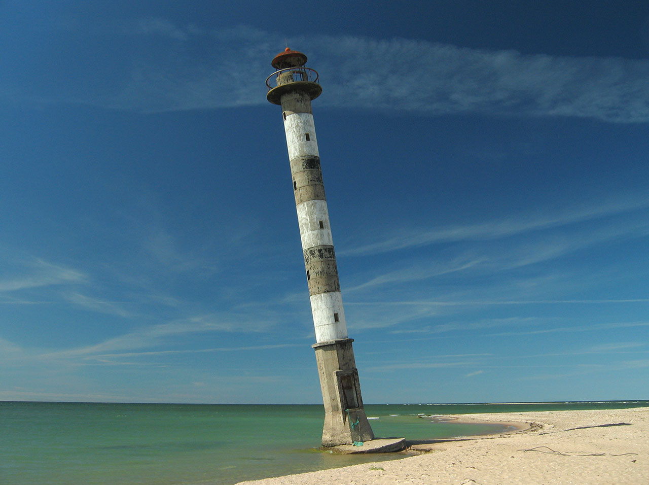 Kiipsaare tuletorn